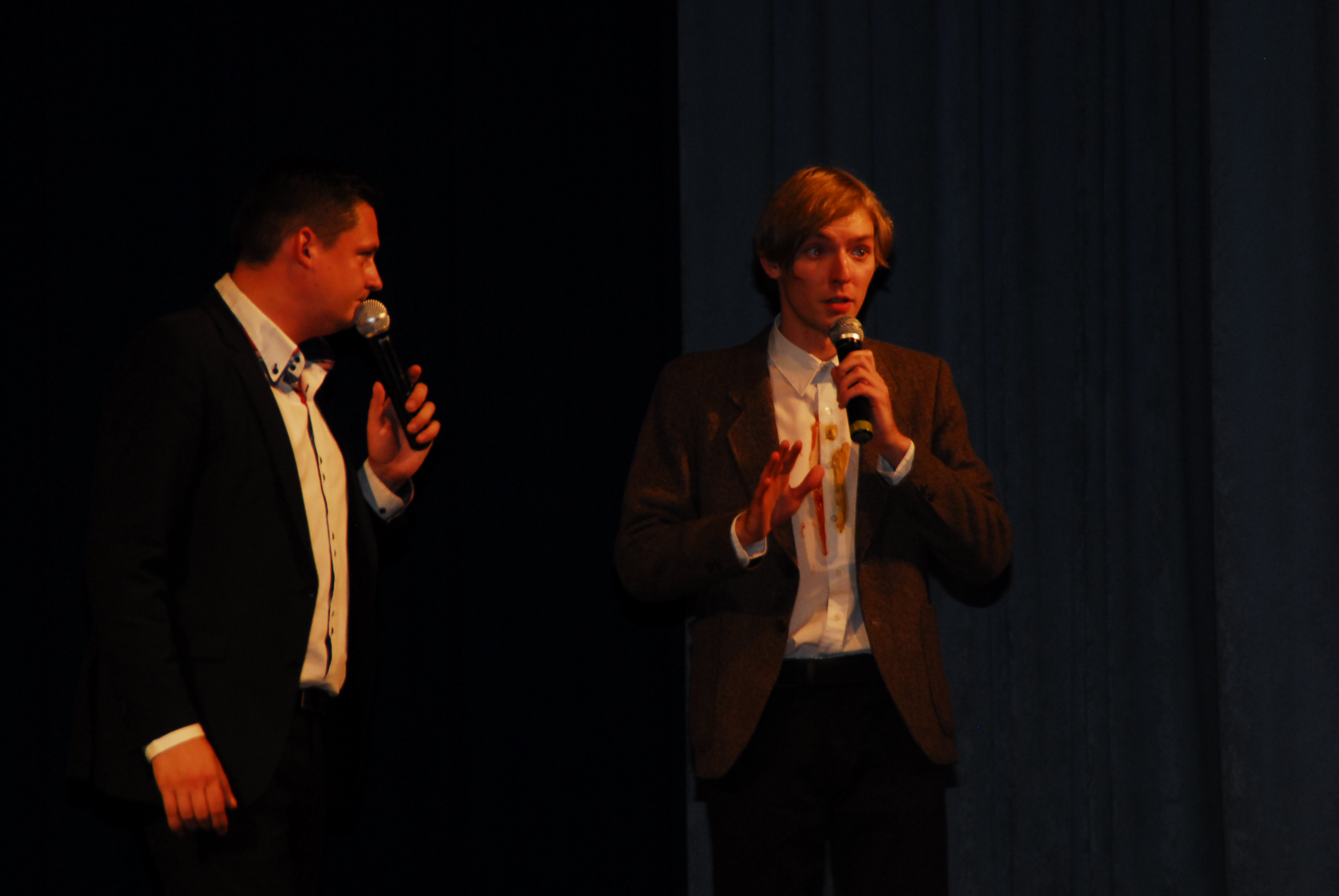 Мелитополь